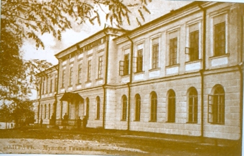 Болградската гимназия - началото на ХХ век. Пощенска картичка, фотограф И. Лътник.